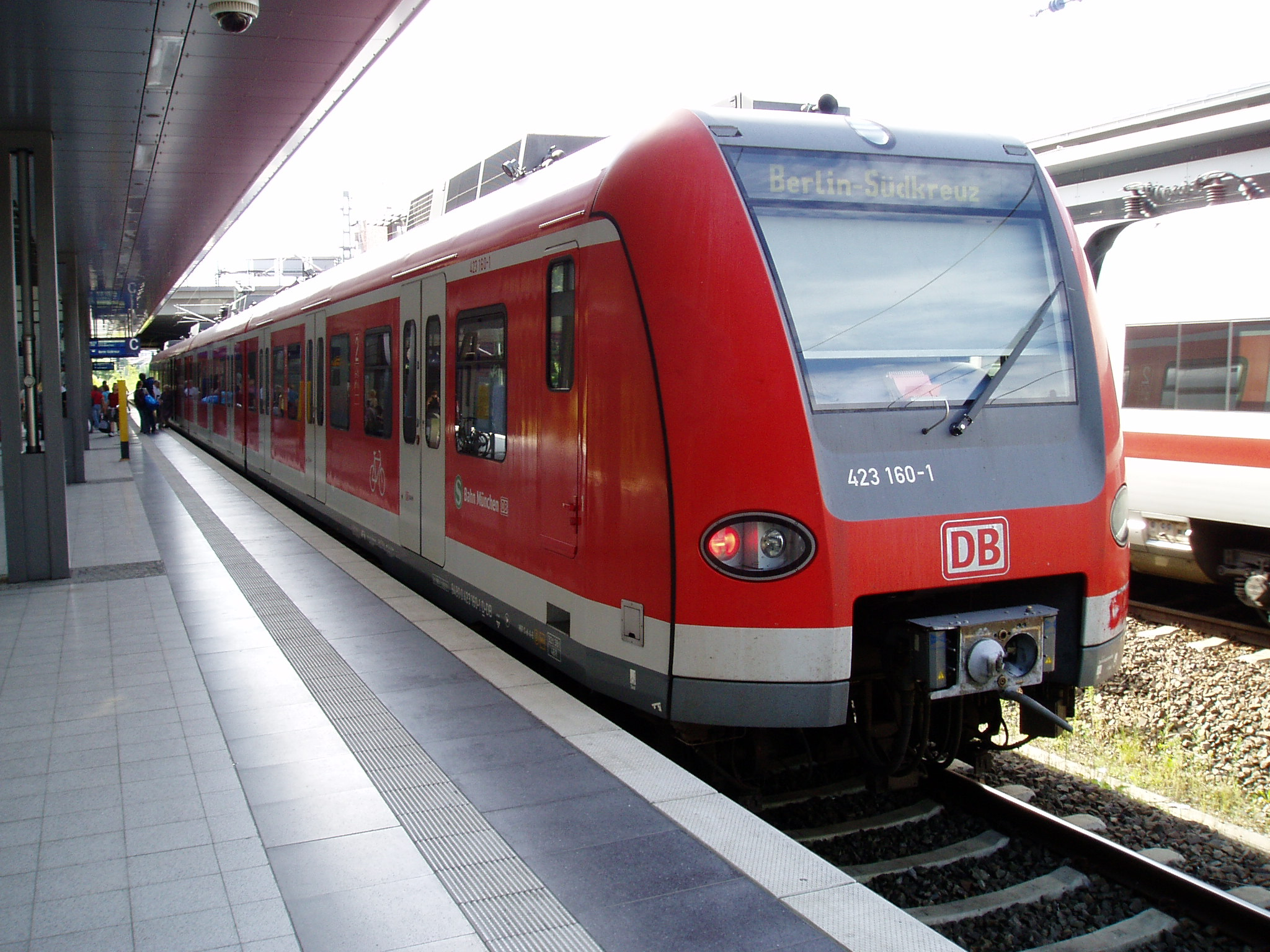 Berlin Bahnhof Gesundbrunnen, Ersatzverkehr mit BR 423 aus München